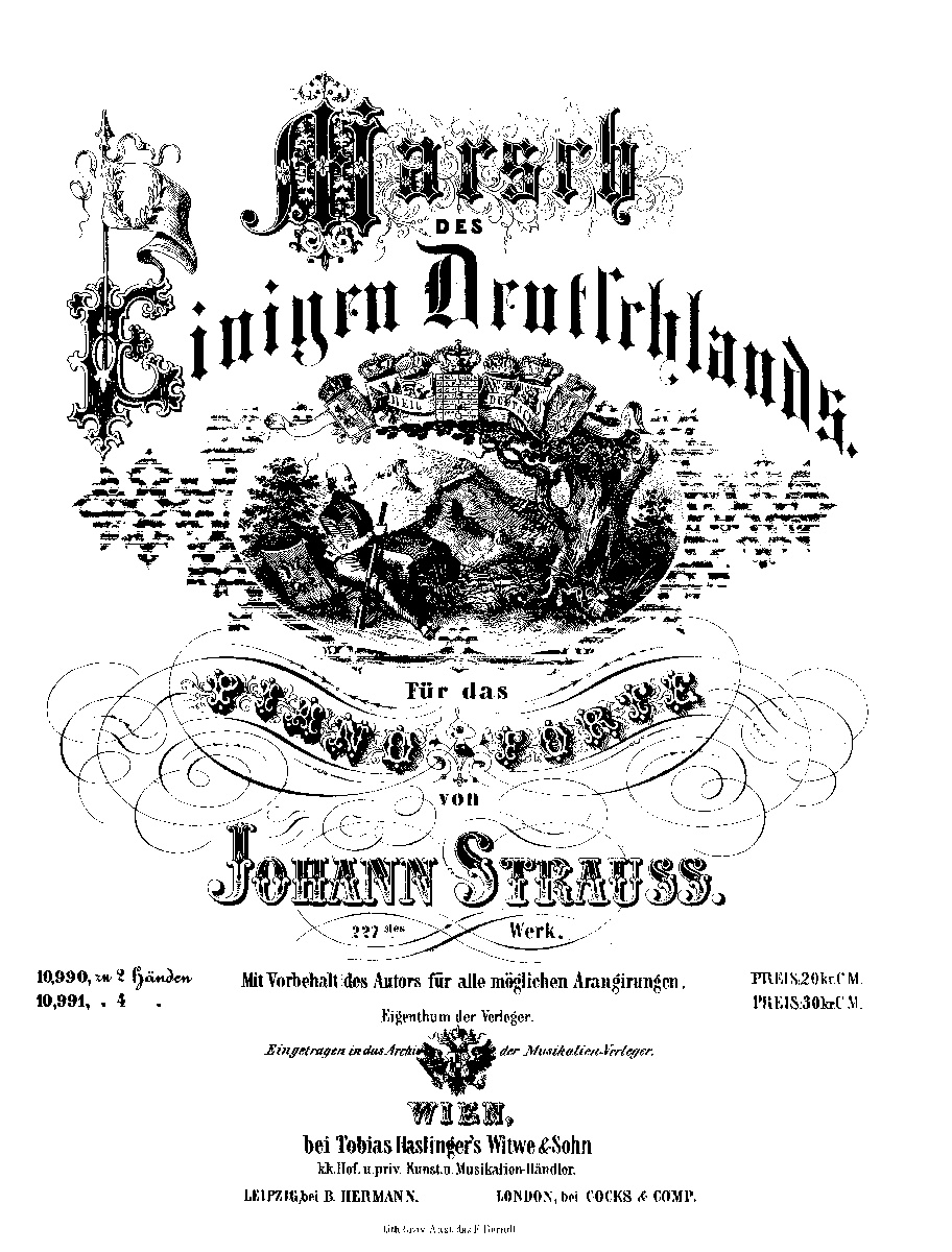 『ドイツ統一行進曲』楽譜表紙